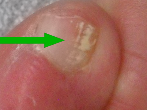 Onychomycosis